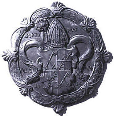 Bronzeschild mit dem Pflug'schen Wappen im Zeitzer Dom